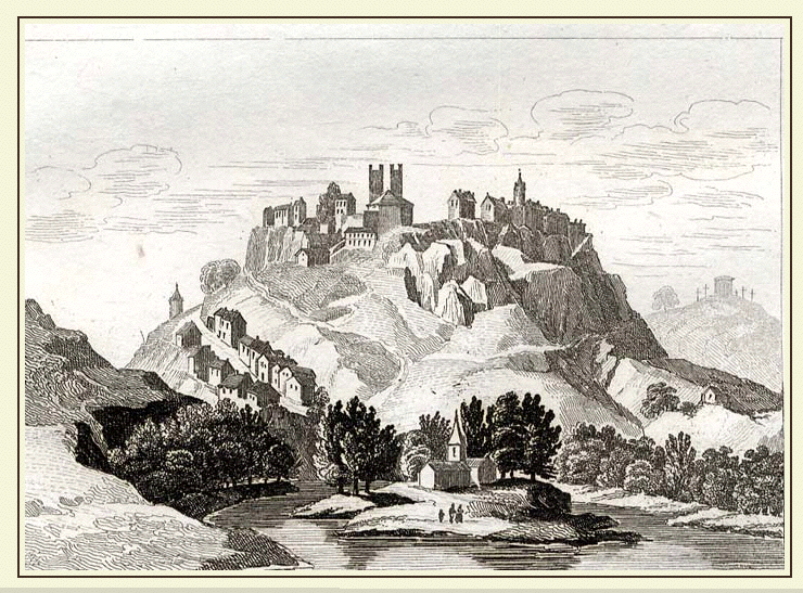 Ville de Saint-Flour, Cantal, France